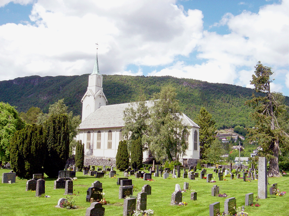 Ørskog and the Ørskog kirke